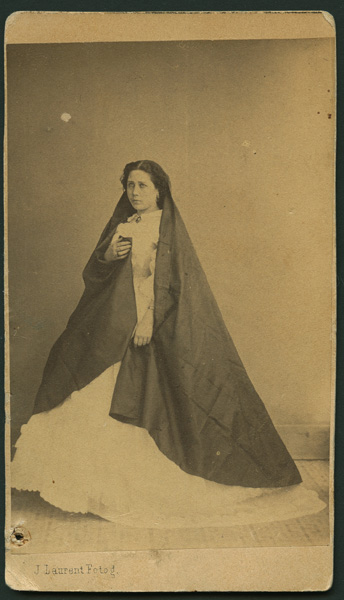 Carte de visite. Amalia Ramírez en La Hija de la Providencia.